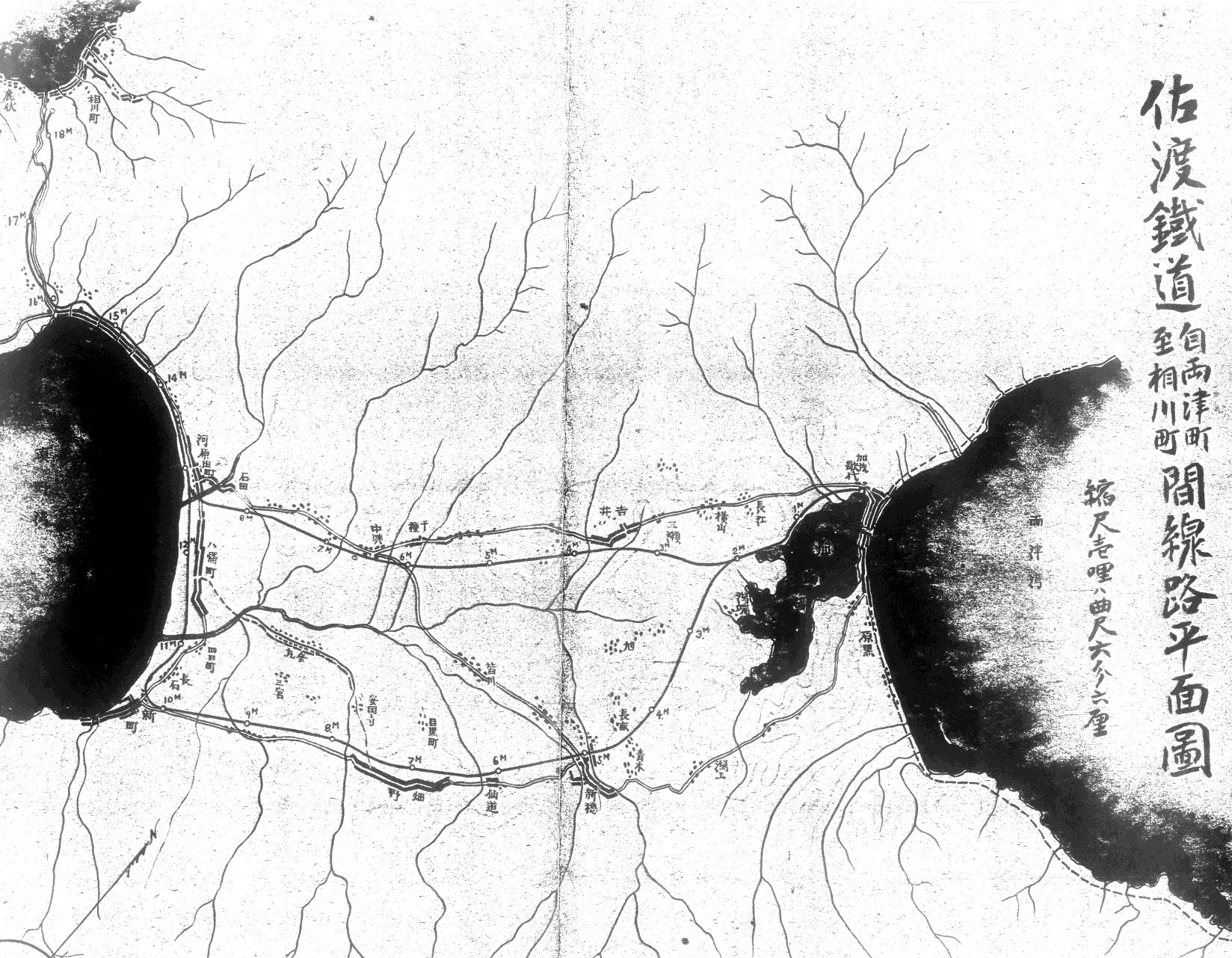 佐渡鉄道自両津町至相川町間線路平面図